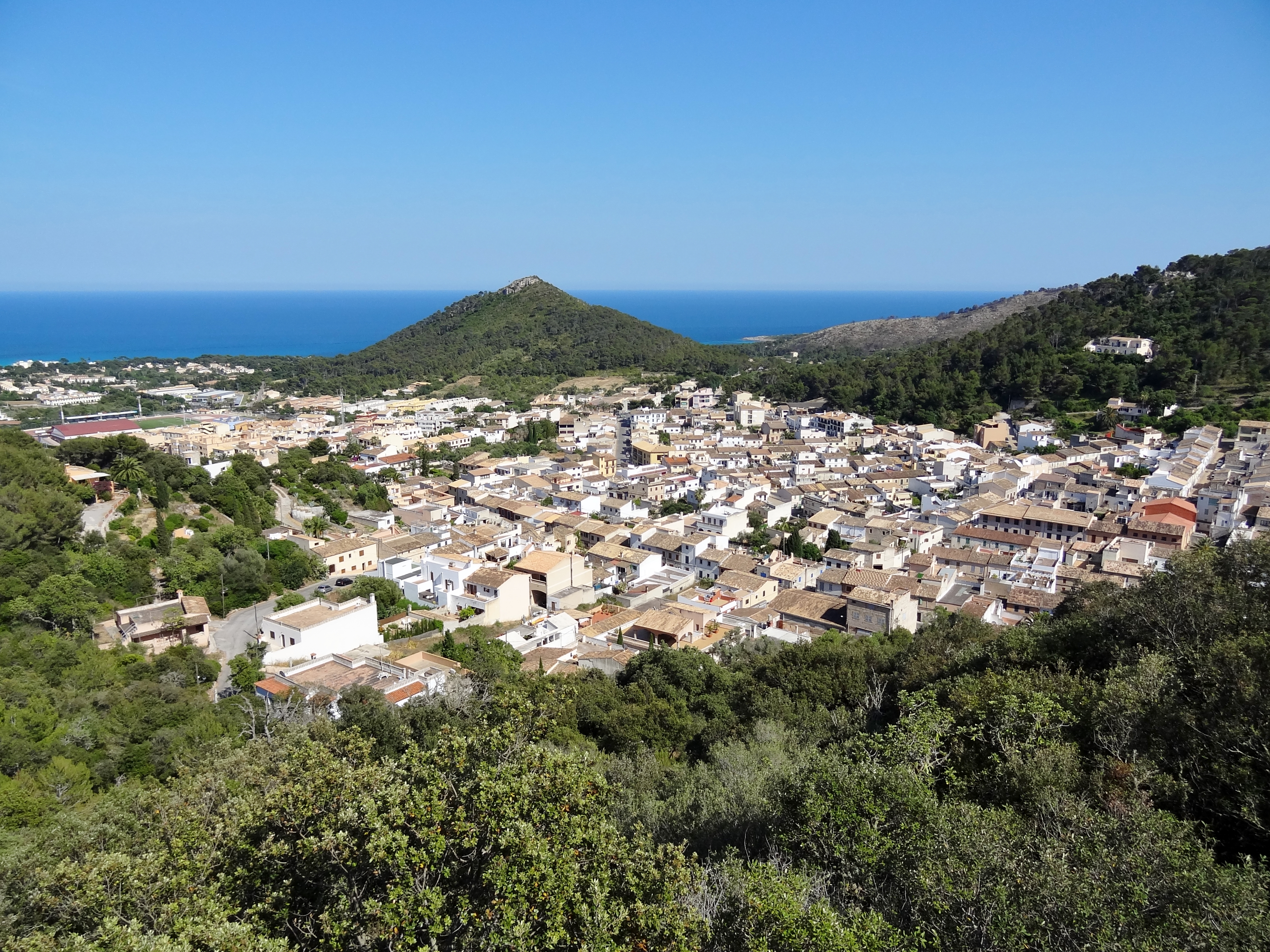 Blick vom Castell de Capdepera auf den Puig Saguer, Gemeinde Capdepera, Mallorca, Spanien